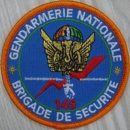 Ecusson de la Brigade de securité